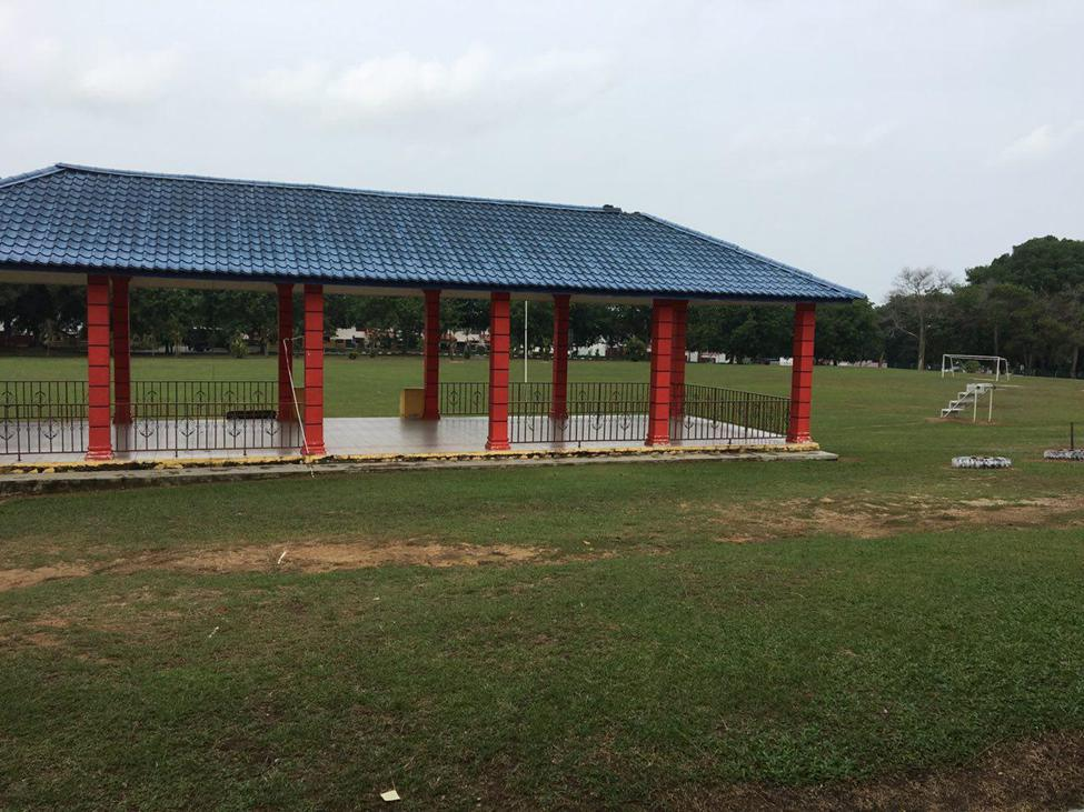 Pentas Gazebo SKKT 1